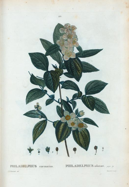 Philadelphus coronarius = Philadelphus odorant.